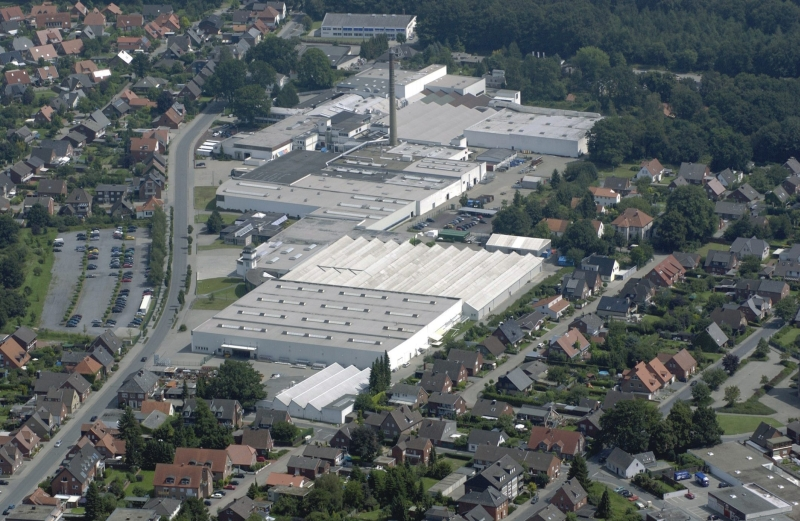 Luftbild der Schmitz-Werke GmbH + Co. KG